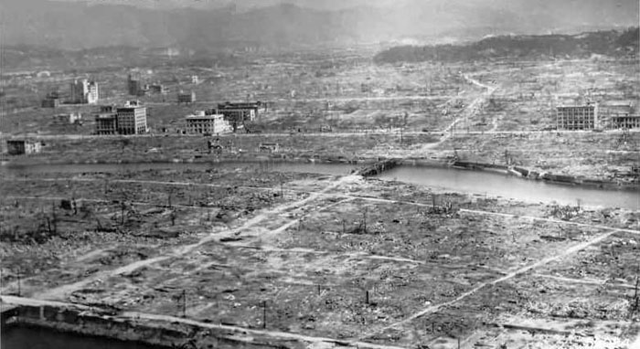 Picture of Hiroshima bomb